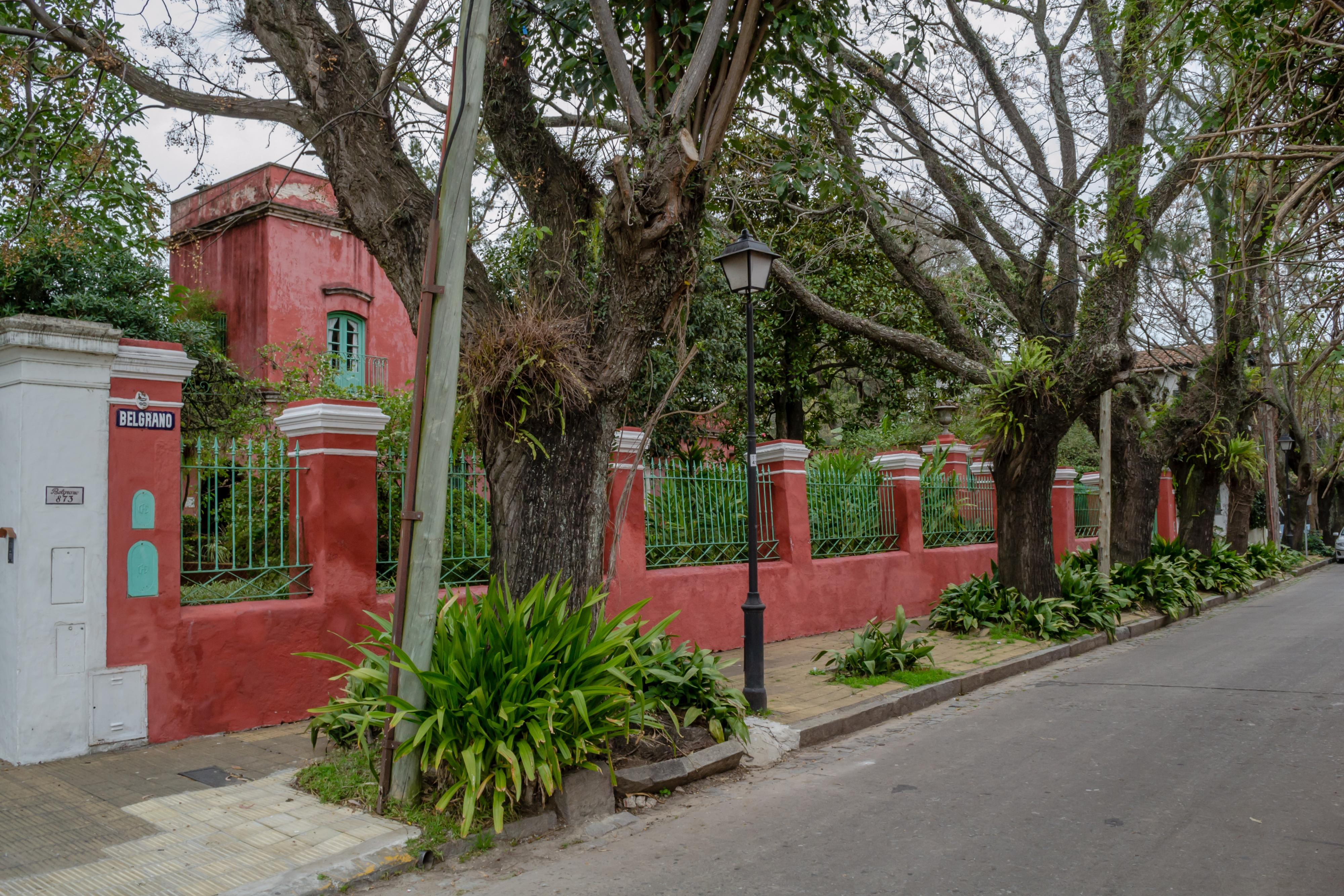 Residencia de Luis Vernet, primer comandante poli­tico-militar de las Islas Malvinas nombrado por Argentina. San Isidro - Provincia de Buenos Aires - Argentina - julio de 2014